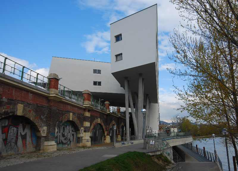 Das nach Plänen von der Stararchitektin Zaha Hadid in Wien am Donaukanal errichtete Wohnhaus (Zaha-Hadid-Haus)